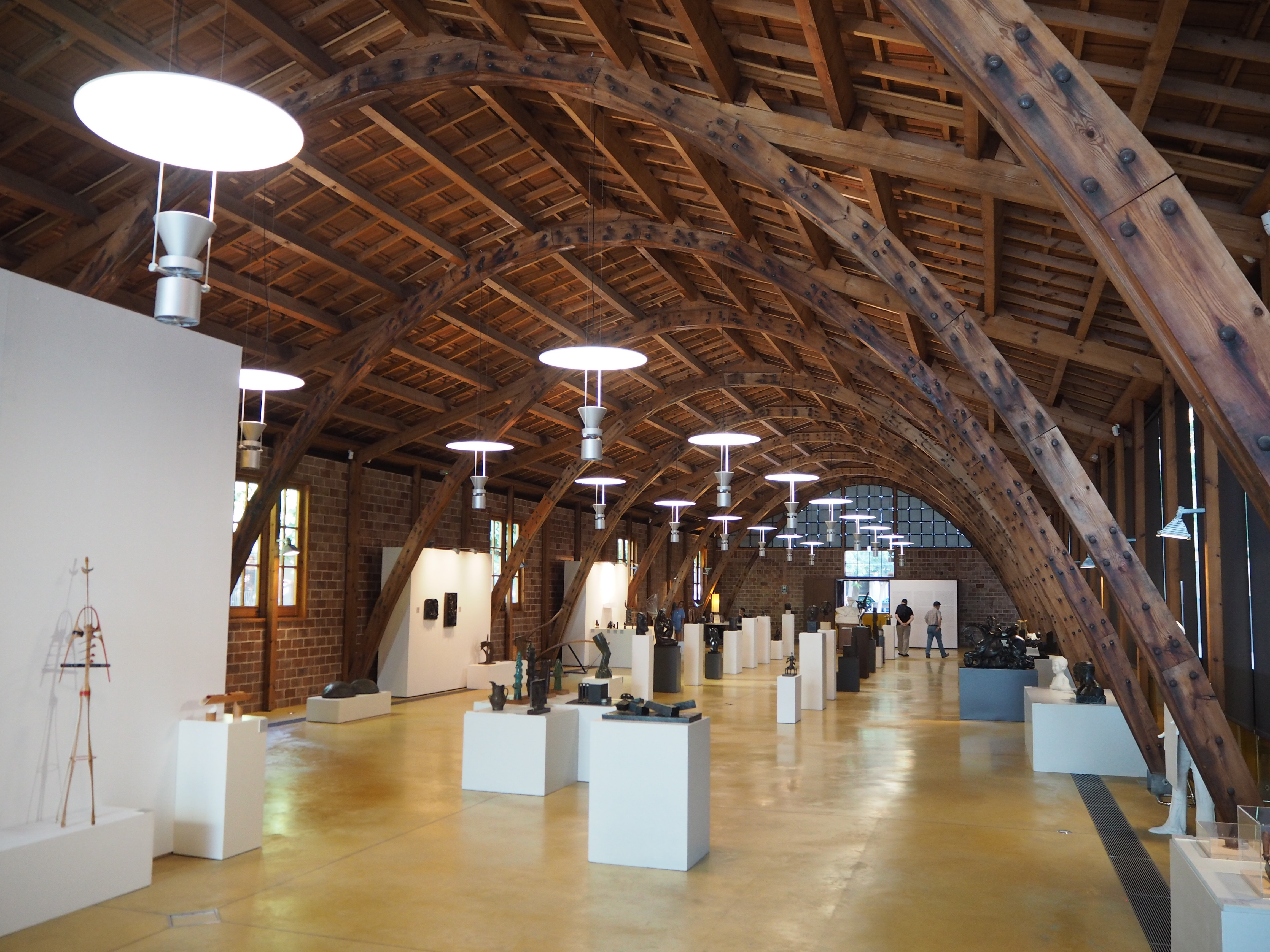 naugaudi.cat/ca